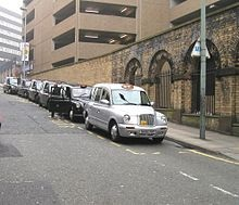 Cab de Liverpool